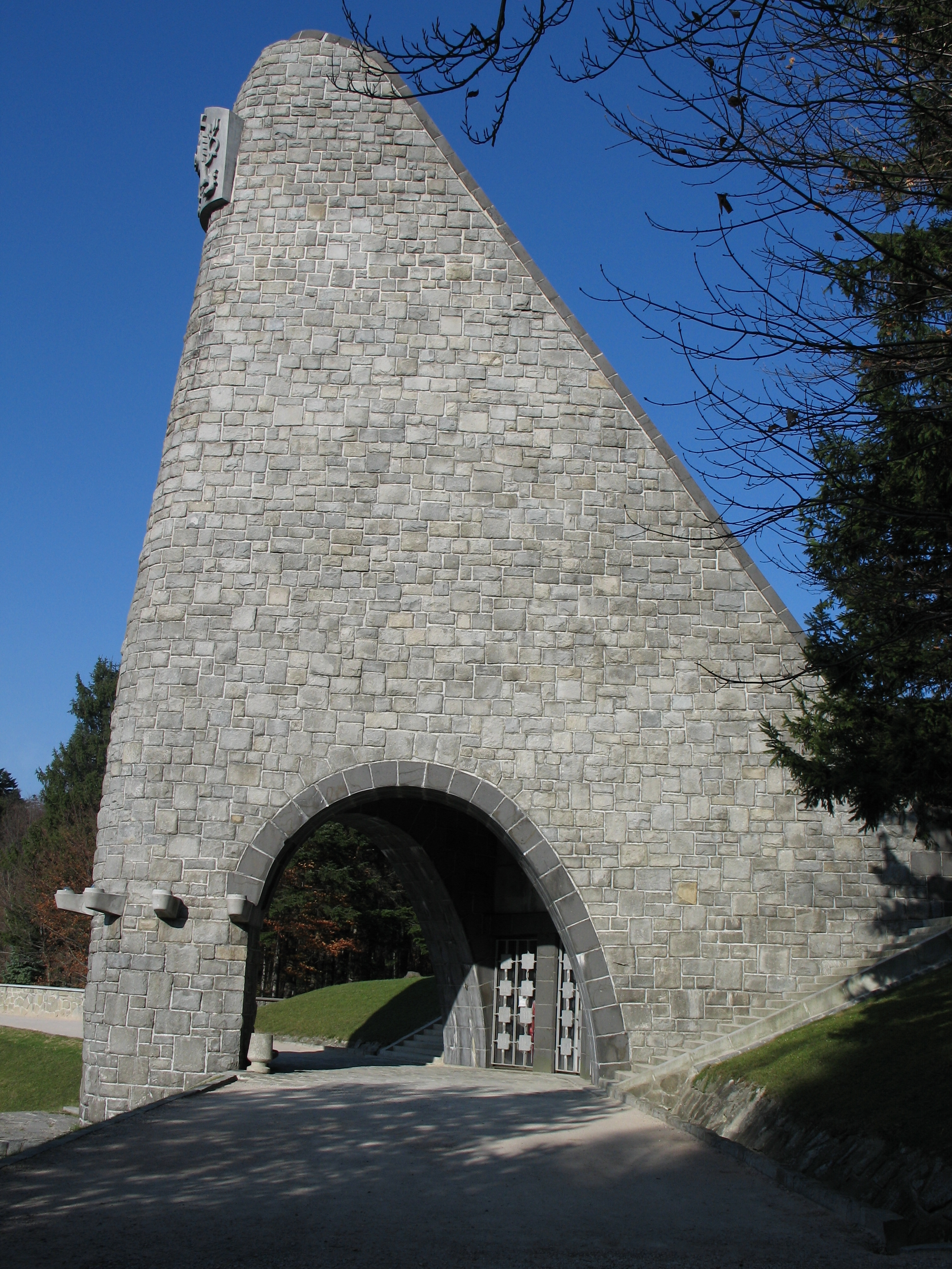 Dukla pamätník, ľavostranný pohľad.